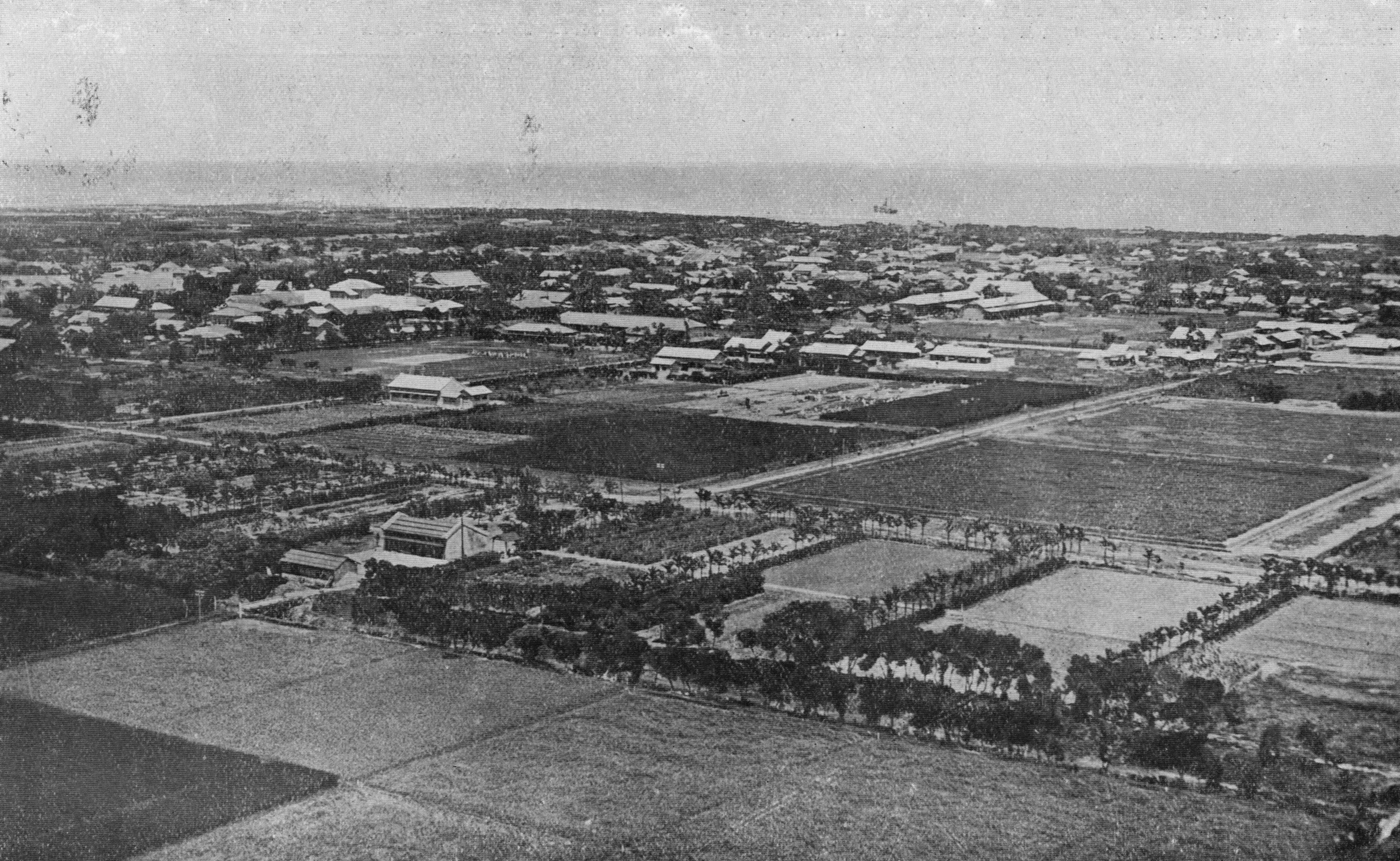 中文（台灣）: 作者：勝山吉作。臺東街。典藏者：中央研究院數位物件典藏者：中央研究院數位文化中心。公眾領域標章（Public Domain Mark）。發佈於《開放博物館》 臺東街位於面積一萬多甲的臺東平野的中心地，也是臺東廳的所在地，人口約一萬人。